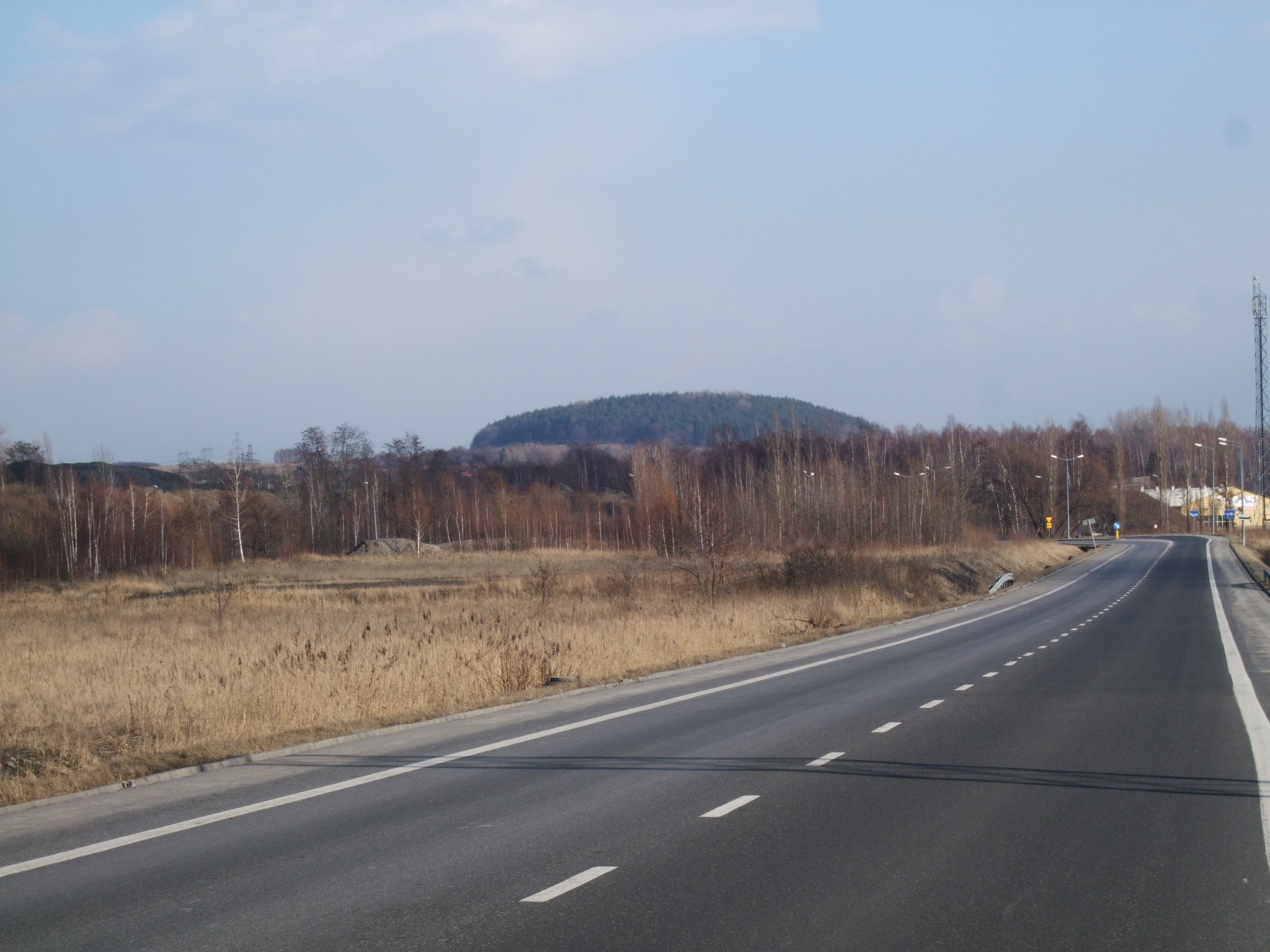 Grodzisko w Jaworznie; najwyższa góra Pagórów Jaworznickich 346m n.p.m.; stanowisko archeologiczne